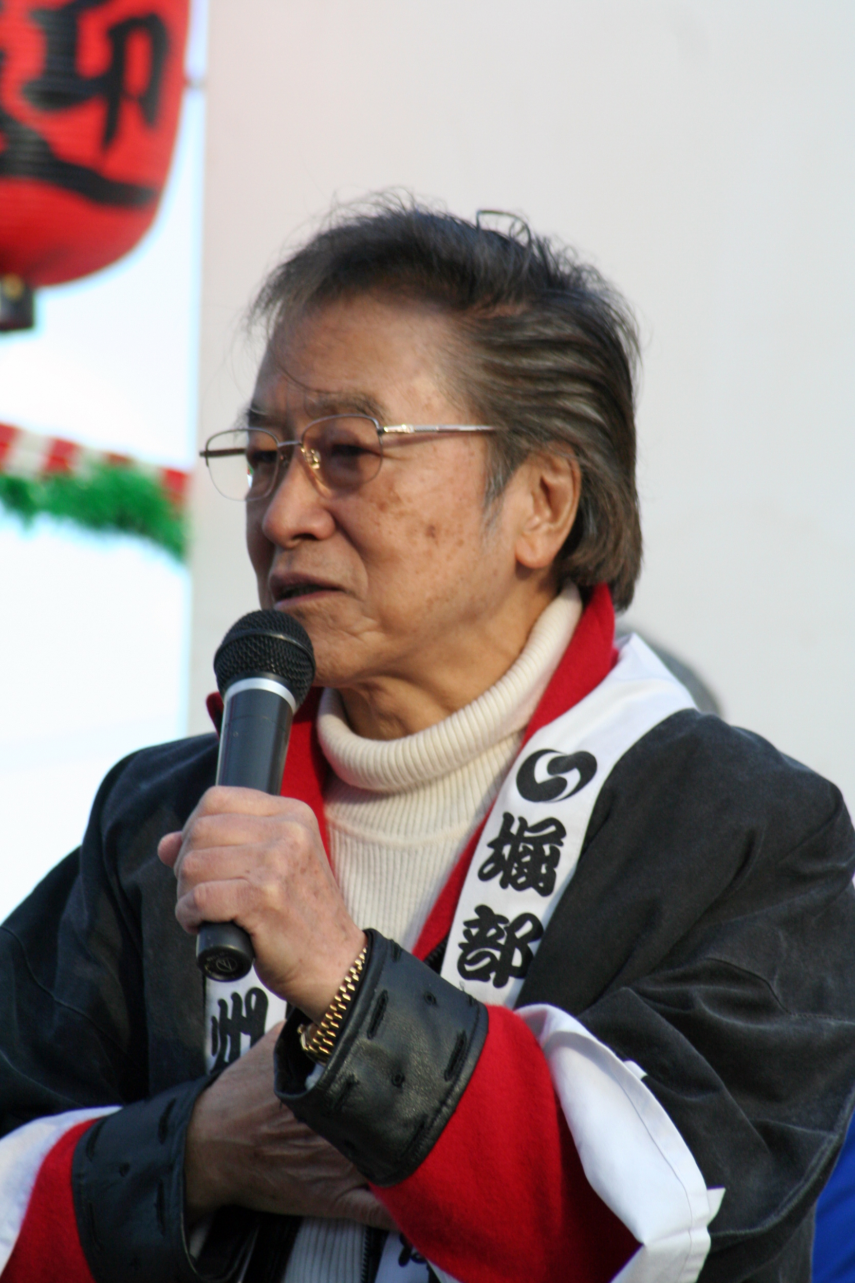 浜村淳。日本の芸能人。京都出身。2009年12月14日に兵庫県赤穂市で開催された赤穂義士祭にて祭りの司会を務めているところを撮影。